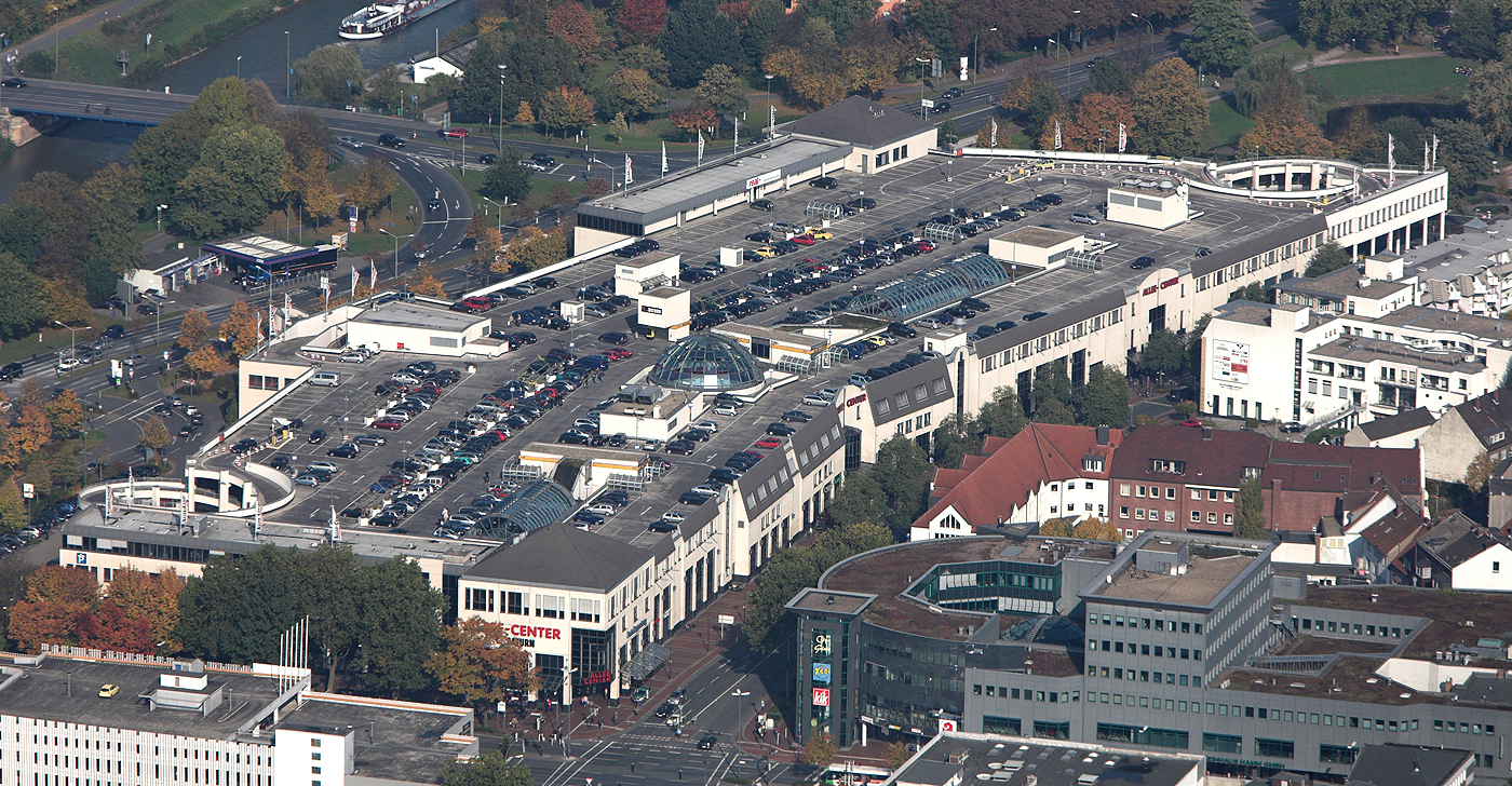 Luftbildaufnahme Hamm